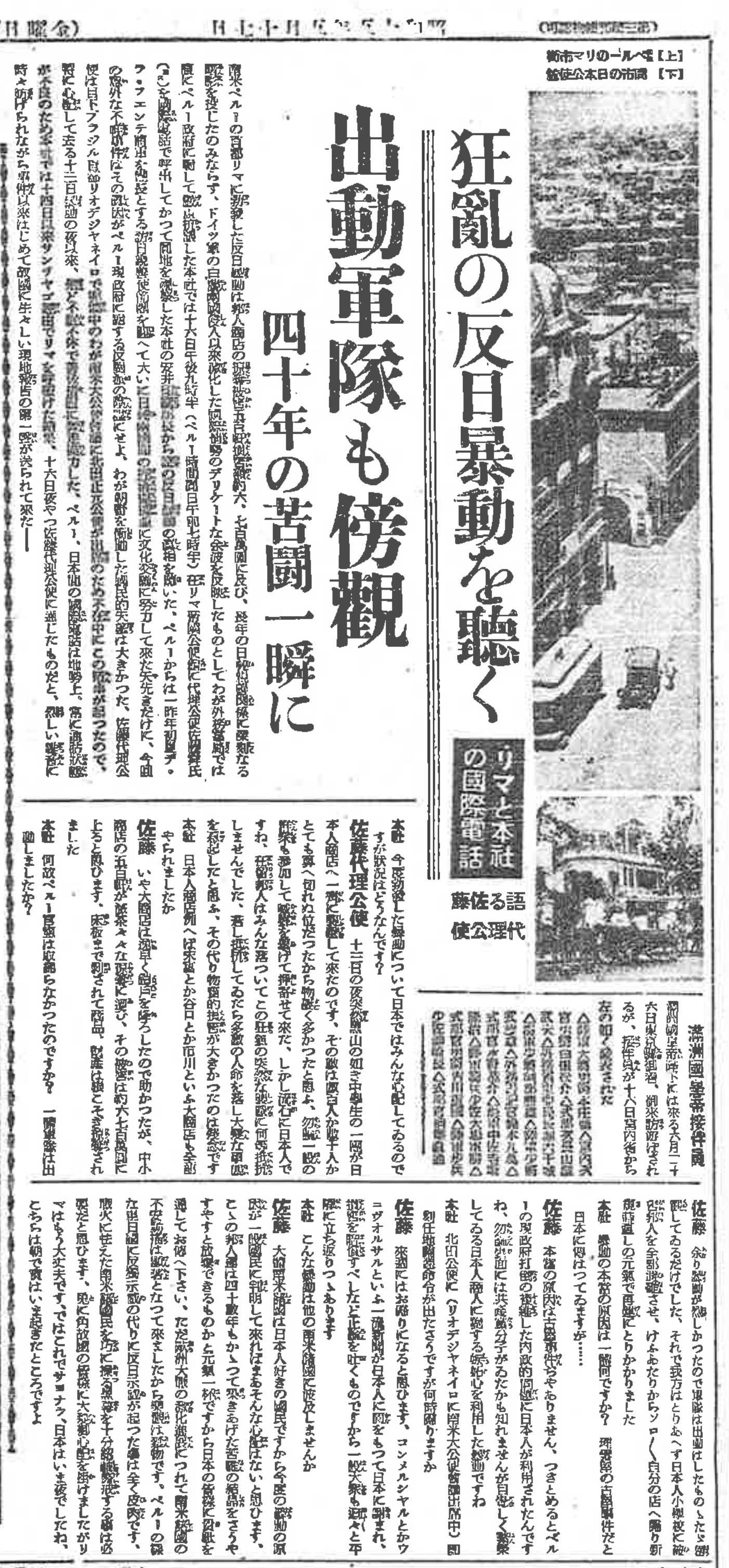 東京朝日新聞1940年5月17日版、朝刊7面に「狂乱の反日暴動を聴く」の記事。1940年5月13日に起きたリマ排日暴動事件について、リマの佐藤領事への国際電話インタビューが掲載されている。